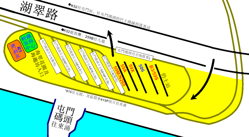 中文（香港）: 屯門碼頭巴士總站(含輕鐵總站)的平面圖